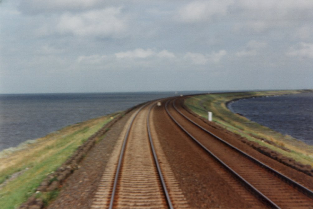 Hindenburgdamm. Aufgenommen aus einem Personenzug, kurz vor der Ankunft auf der Insel Sylt. Selbst fotografiert.